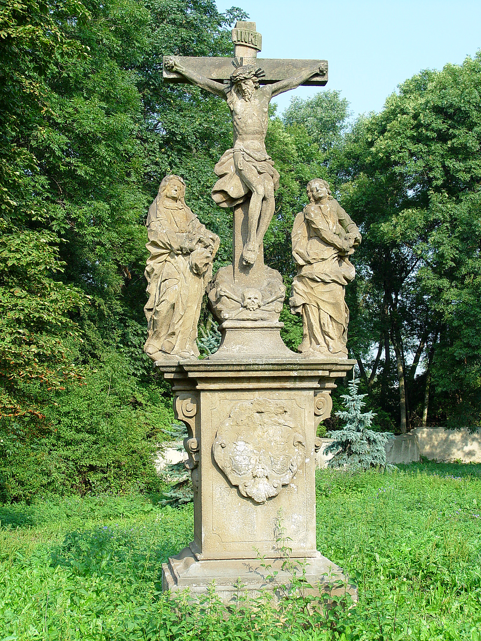 Sousoší Kalvárie (Lišnice), areál zámku, Lišnice